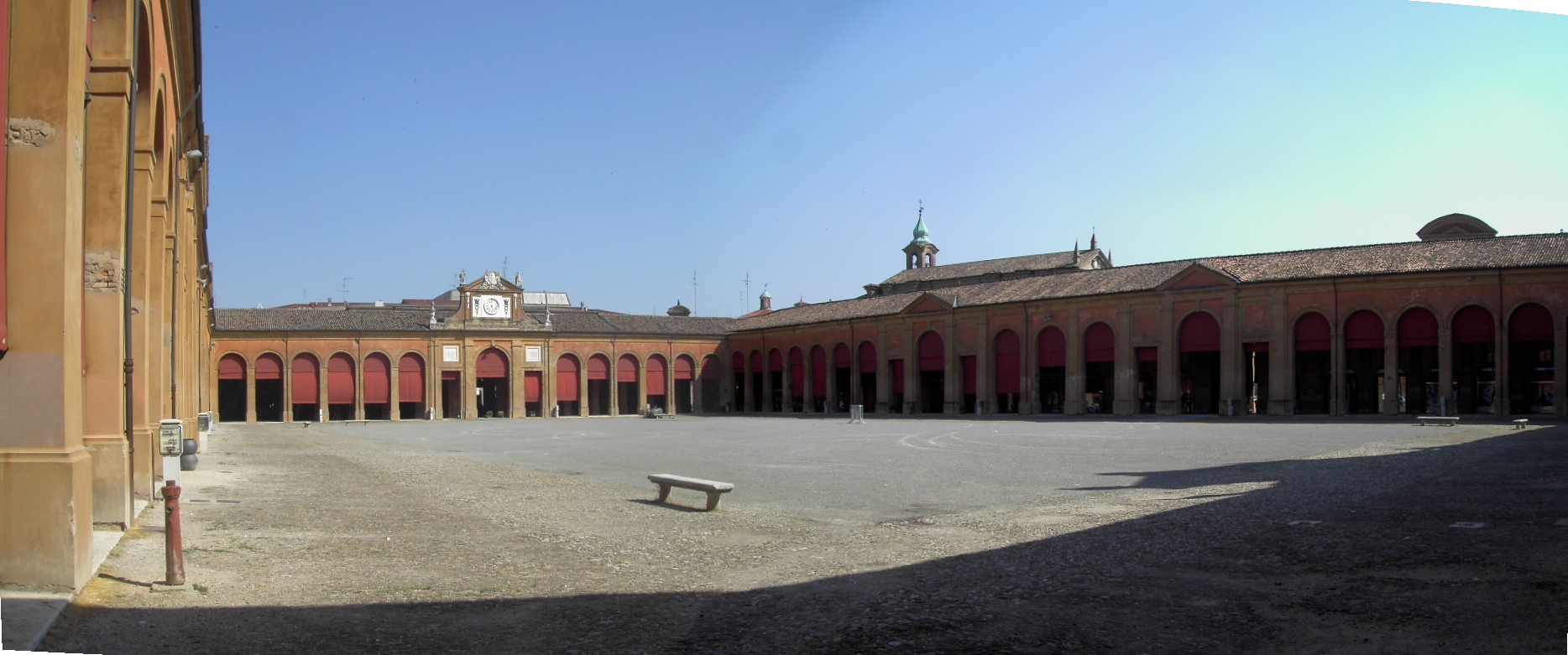 Lugo: il Pavaglione